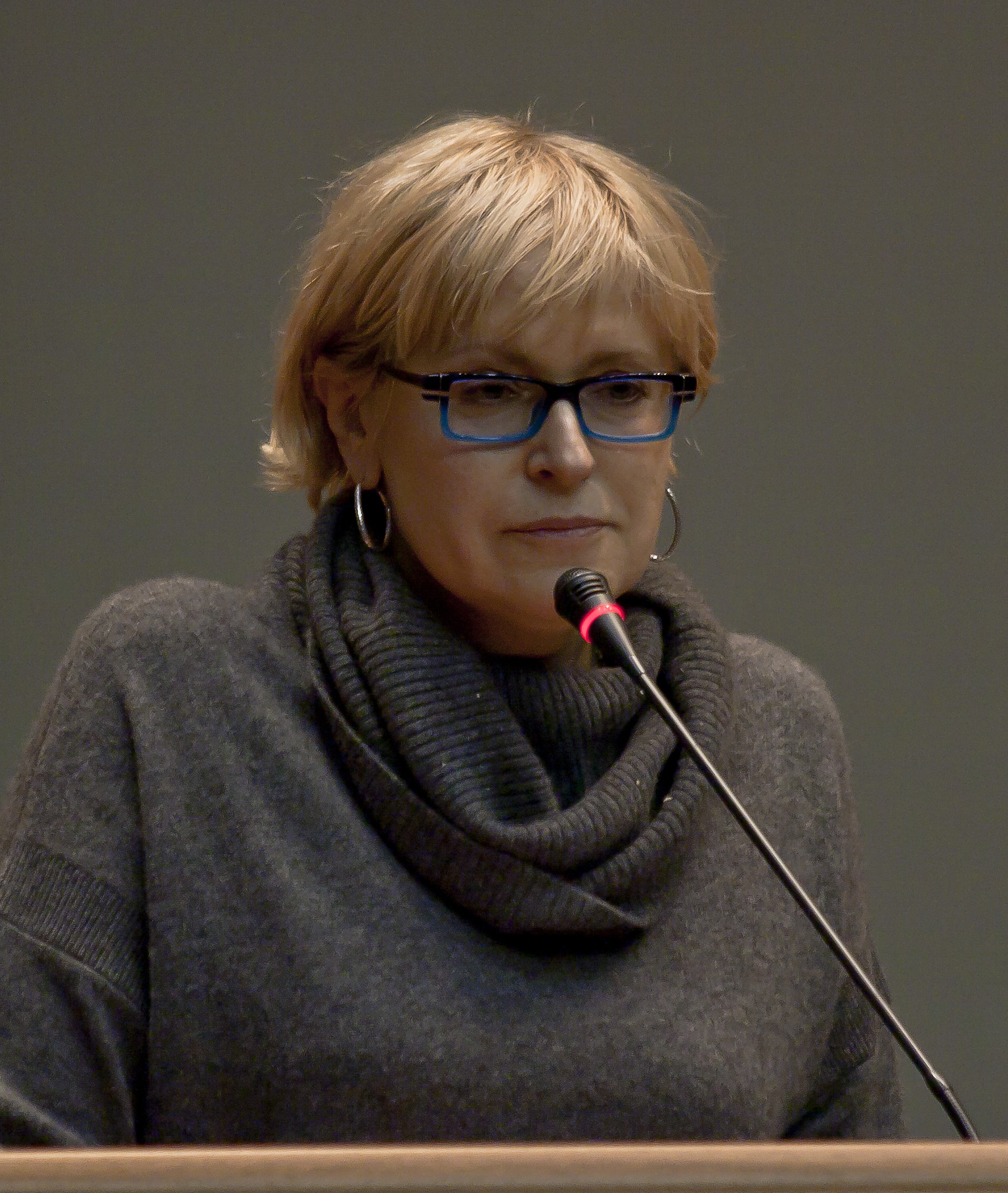 фото кардіолога Катерини Амосової